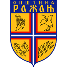 Грб општине Ражањ